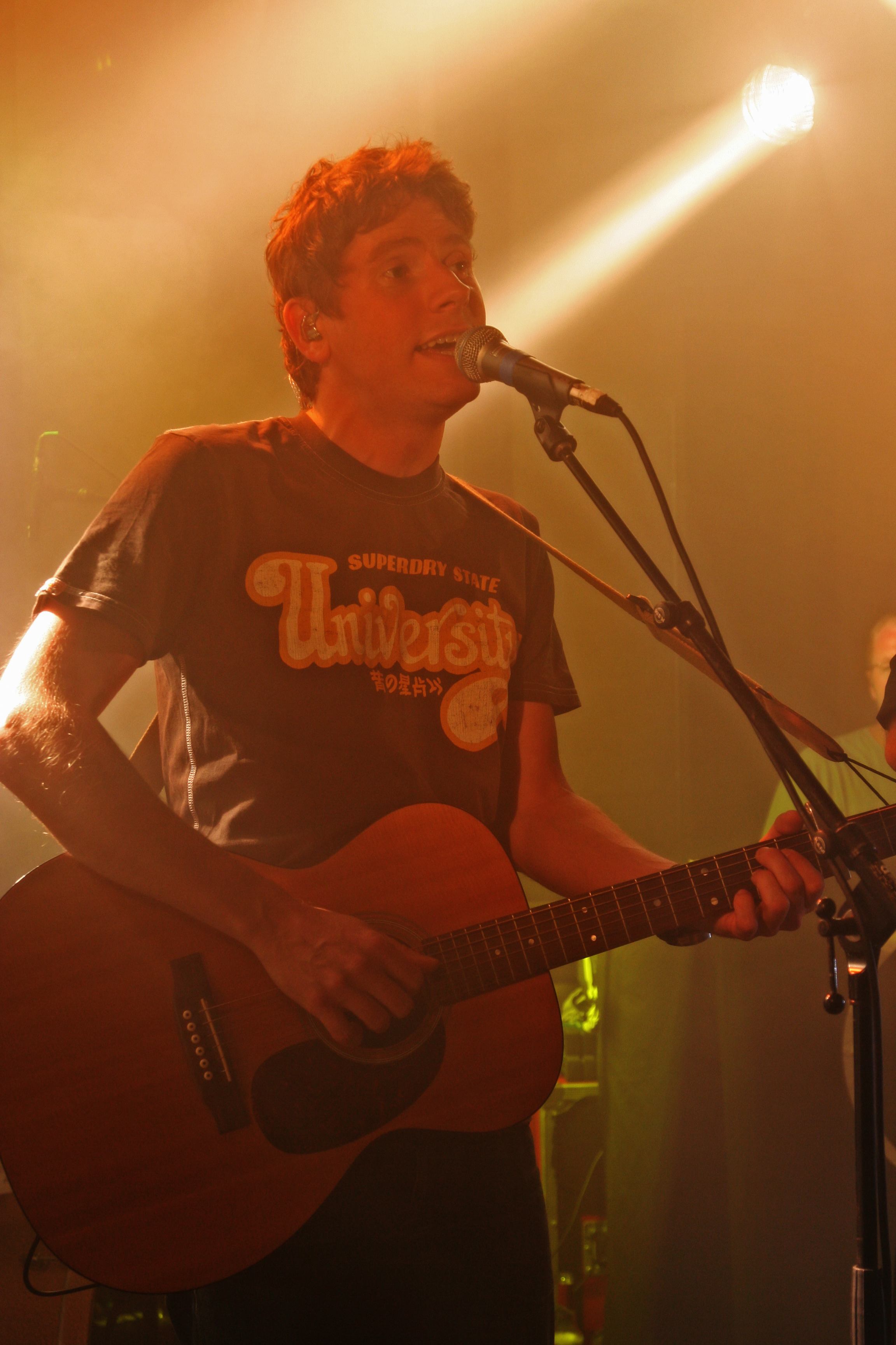 Nils Petter Time fra Postgirobygget spiller på Singstar Norsk på Norsk lansering Tatt av Marcus Ramberg